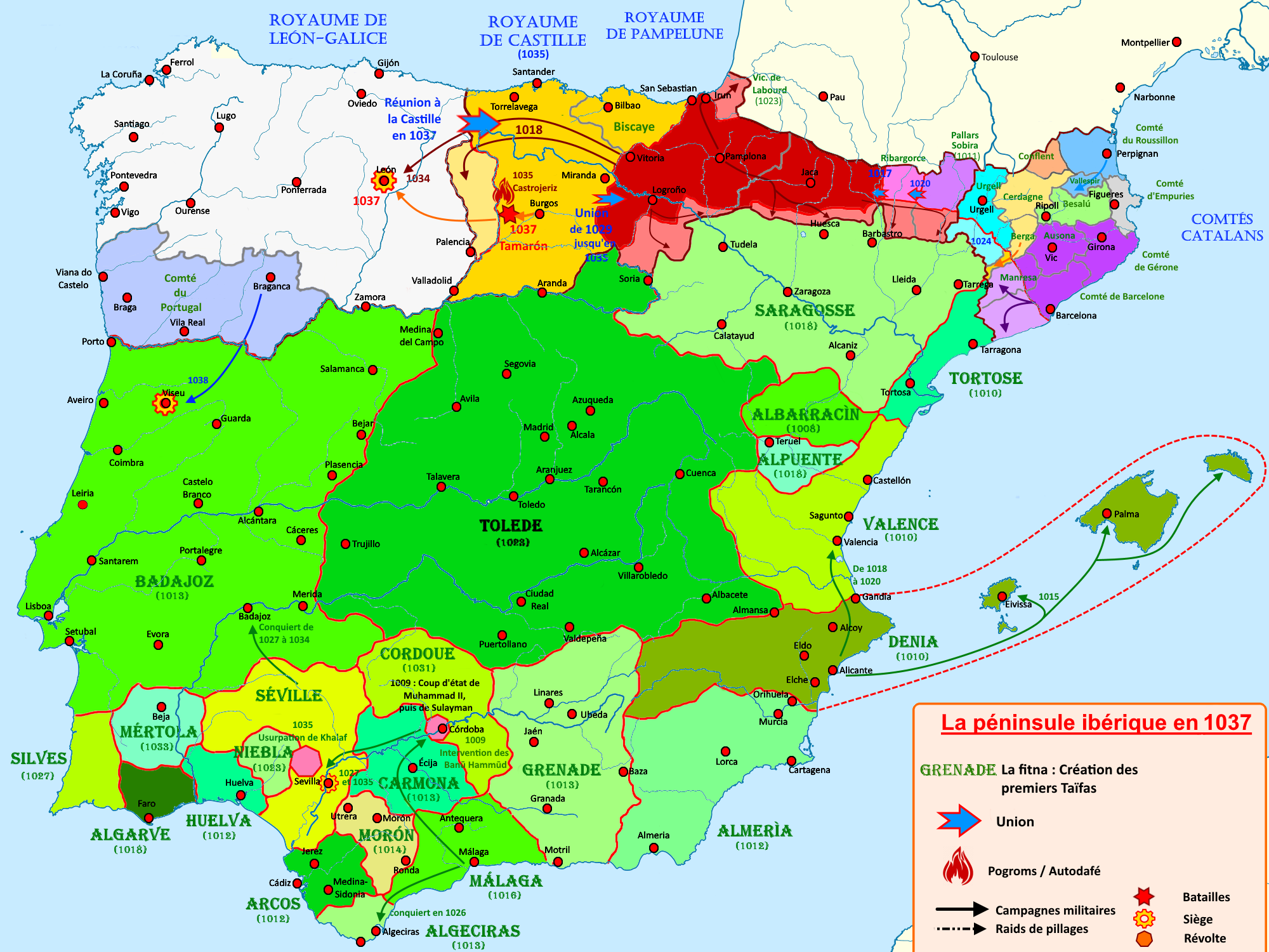 Carte de la péninsule ibérique de 1002 à 1037 illustrant les principaux évènements